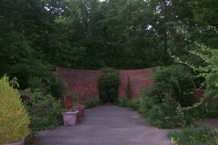 A garden in Wildwood Metropark